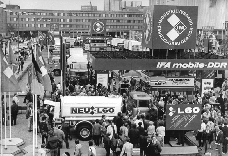 Leipzig, Herbstmesse, Straßenfahrzeuge ADN-ZB Ludwig-4.9.86 Leipzig: Herbstmesse 86-Hauptanteil am internationalen Angebot in der Branche Straßenfahrzeuge haben die im IFA-Warenzeichenverband zusammengeschlossenen Betriebe des Straßenfahrzeugbaus der DDR. Der VEB IFA-Kombinat Nutzkraftwagen Ludwigsfelde stellt als Neuentwicklung den L 60 vor. Das Fahrzeug wird hier mit mehreren Aufbauten für unterschiedliche Verwendungszwecke gezeigt.